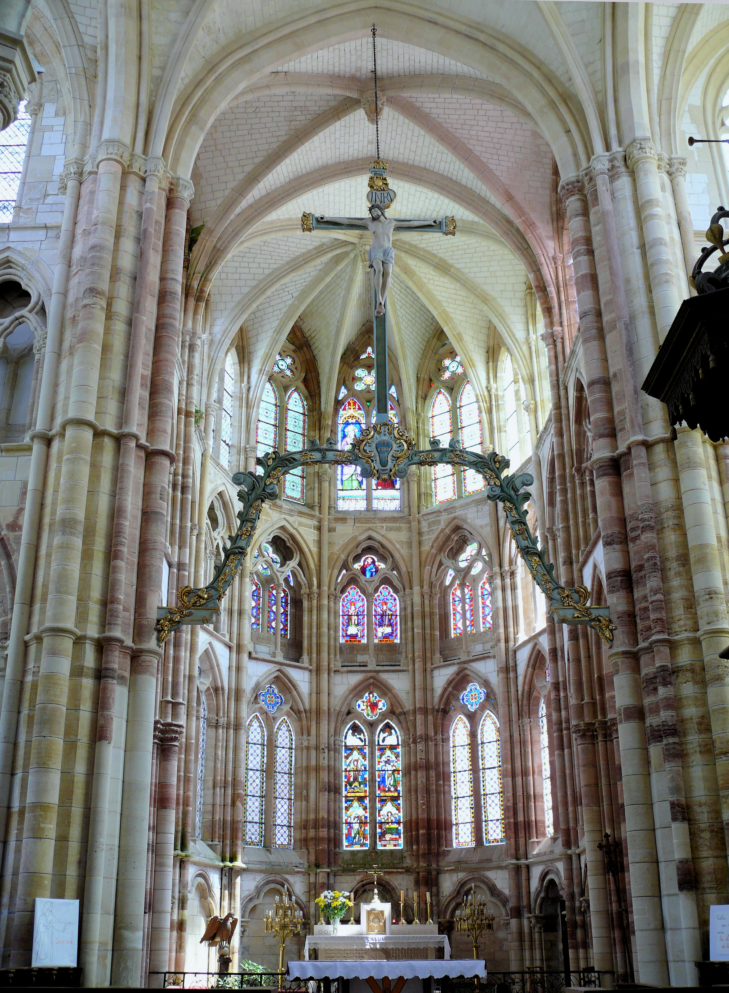 Église Saint-Amand de Saint-Amand-sur-Fion - Le choeur